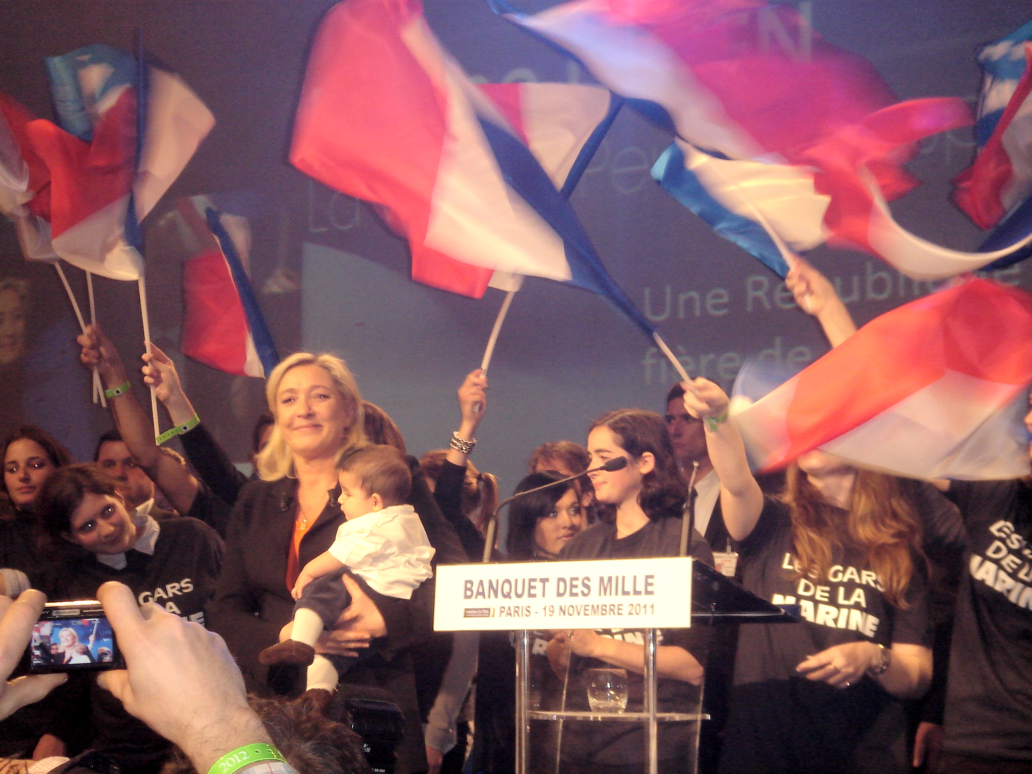 Présentation du programme présidentiel de Marine Le Pen, samedi 19 novembre 2011, Banquet des mille, salle Équinoxe, Paris.